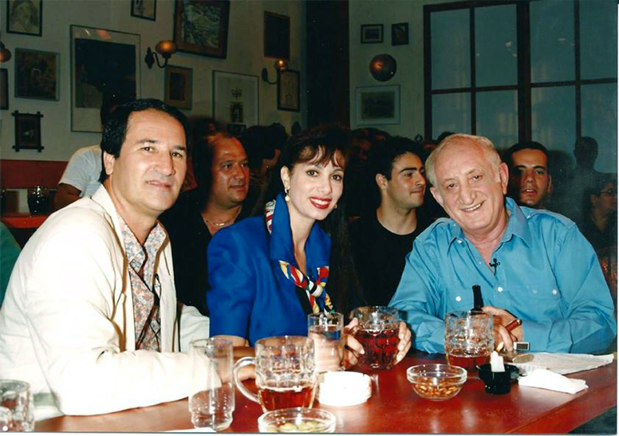 טל ברודי ורעייתו עם יענקלה יעקב אגמון בתכנית "בירה ומצב רוח"